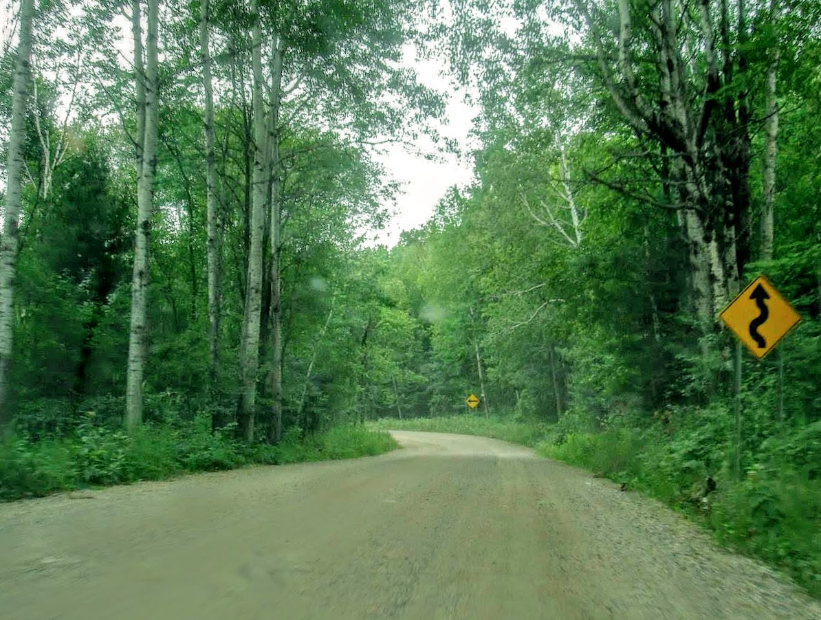 Tronçon en gravier de la route québécoise 366, direction ouest.